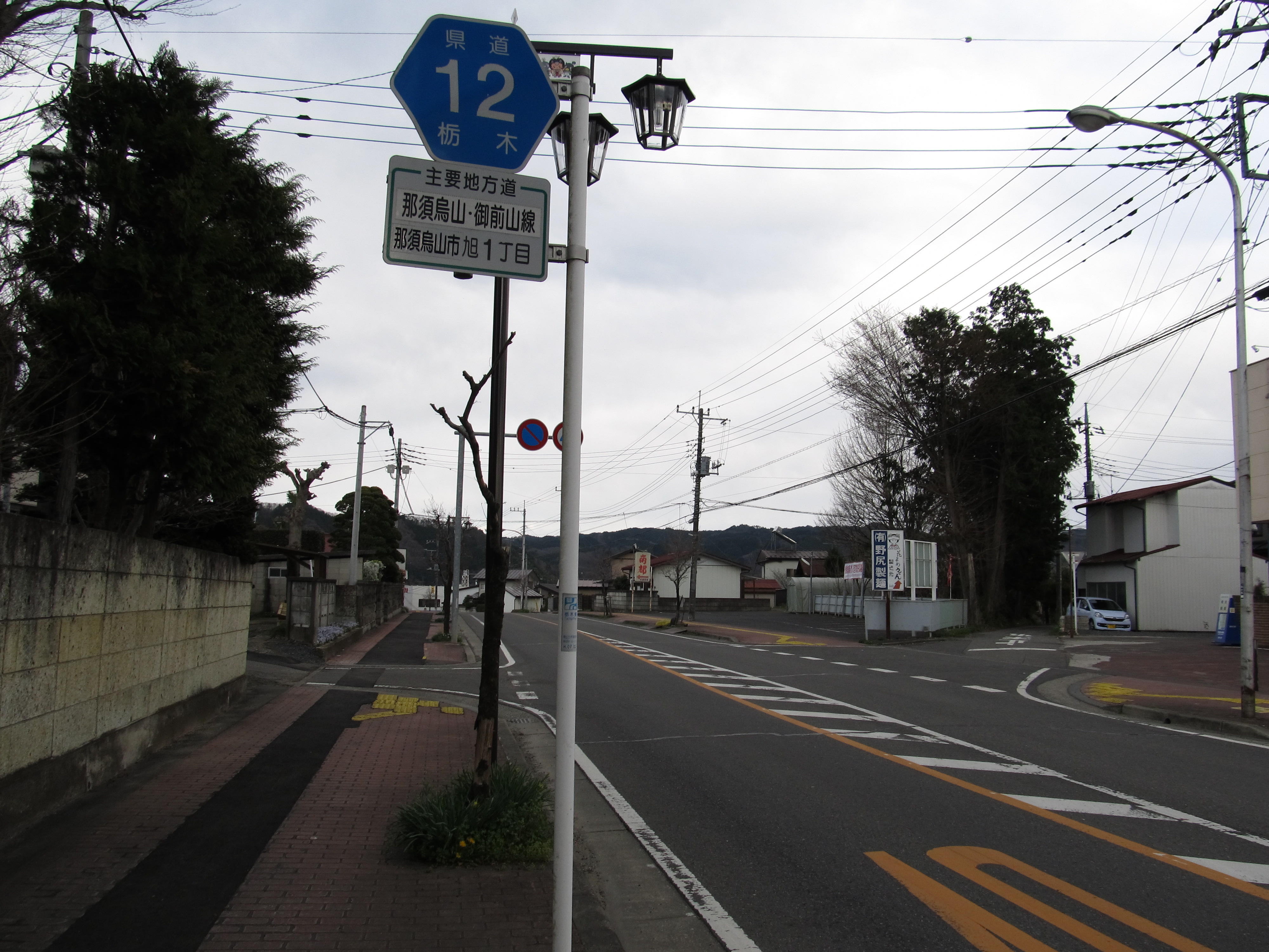 栃木県道・茨城県道12号那須烏山御前山線の起点（那須烏山市旭交差点）から東方向を見て撮影。